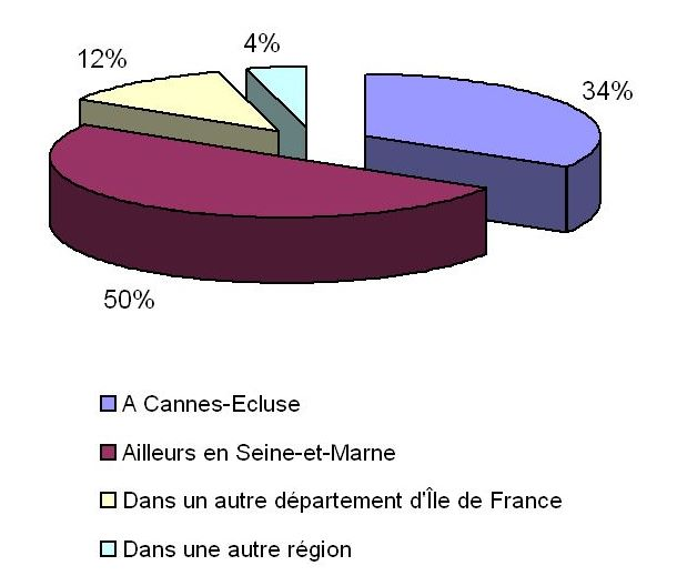 Répartition de la population active de Cannes-Eclsue en fonction de son lieu de travail